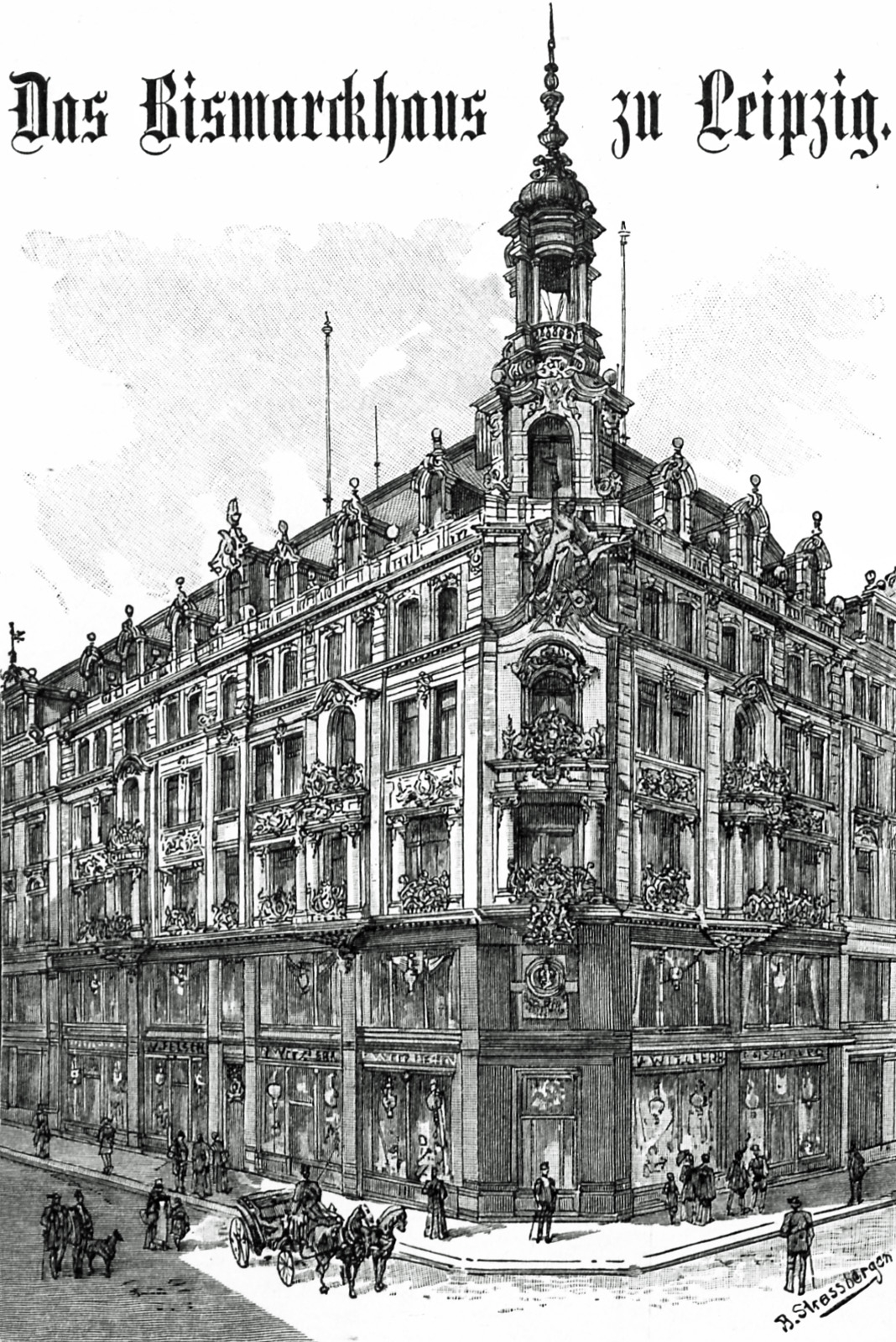 Das Bismarckhaus in Leipzig, Zeichnung aus der Illustrirten Zeitung von 1897